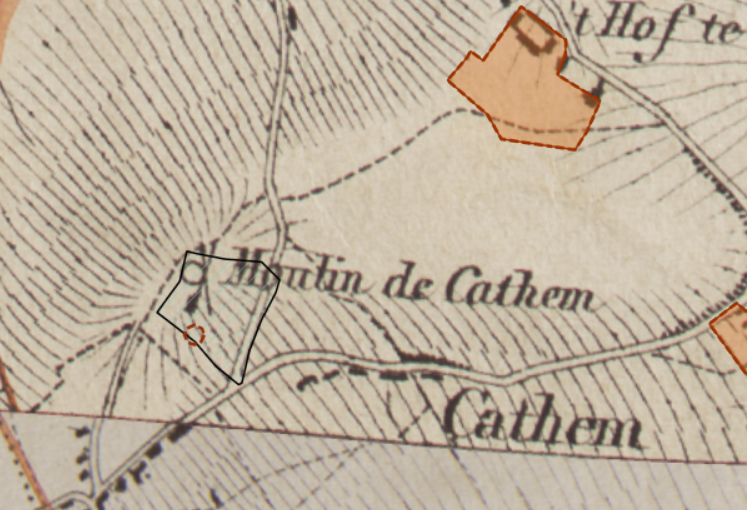 Cattemmolen op de Vandermaelenkaart